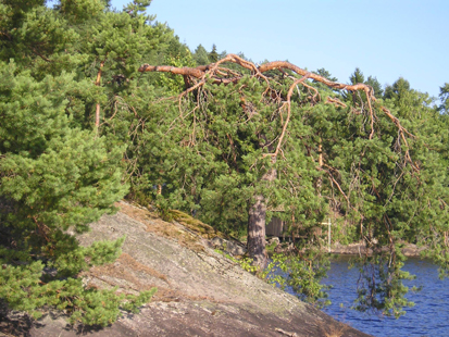 Furuslekten. Under karrige forhold kan furua anta atypiske former.